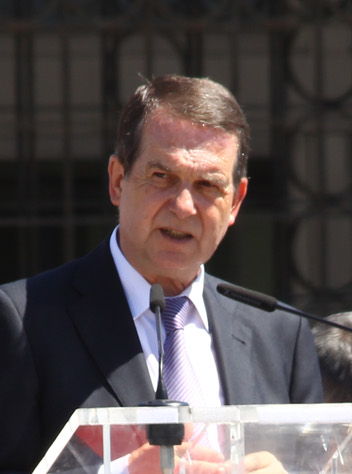 El alcalde de Vigo, Abel Caballero, dirigiéndose a los agentes de la Policía Local